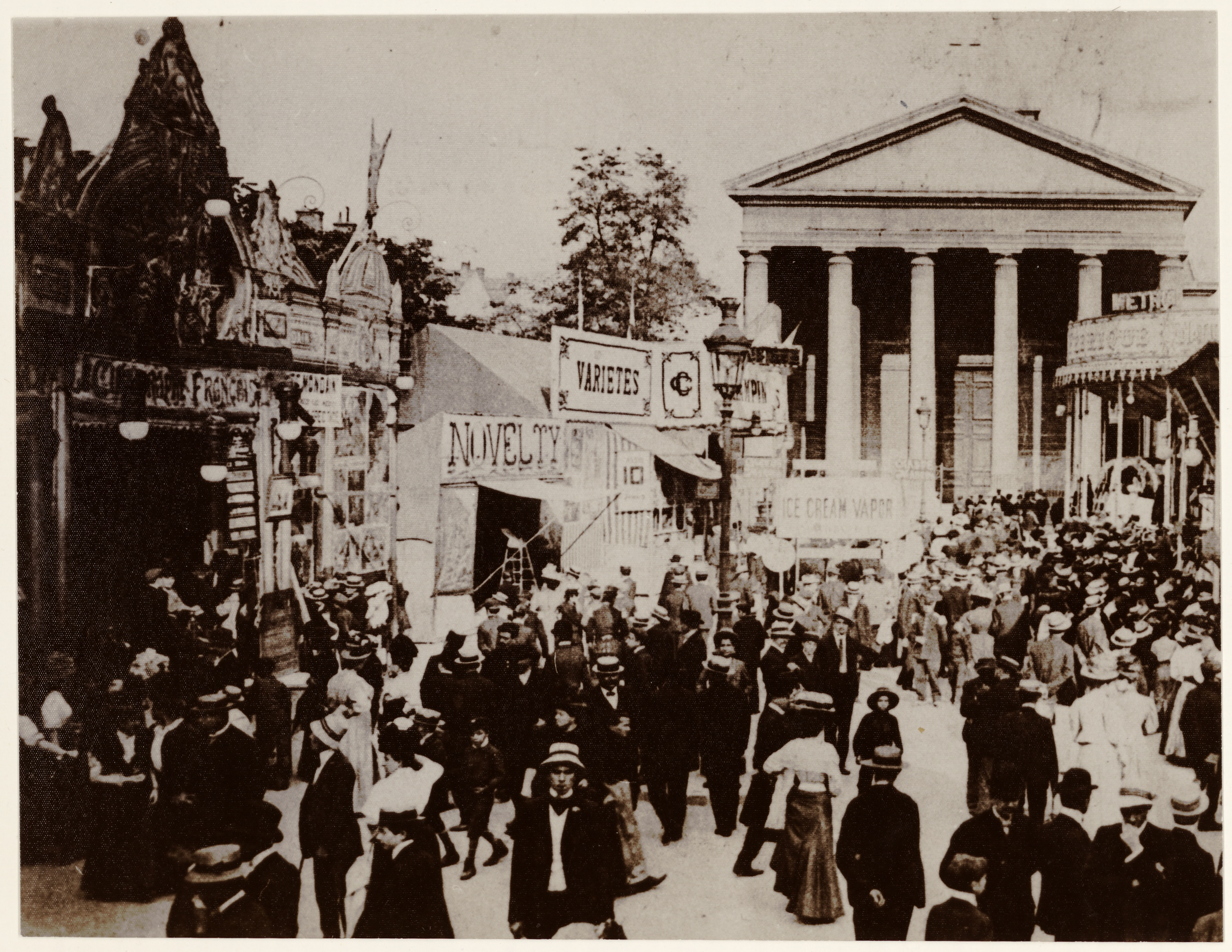 Vogue devant l'église Saint-Pothin, au début du XXe siècle.